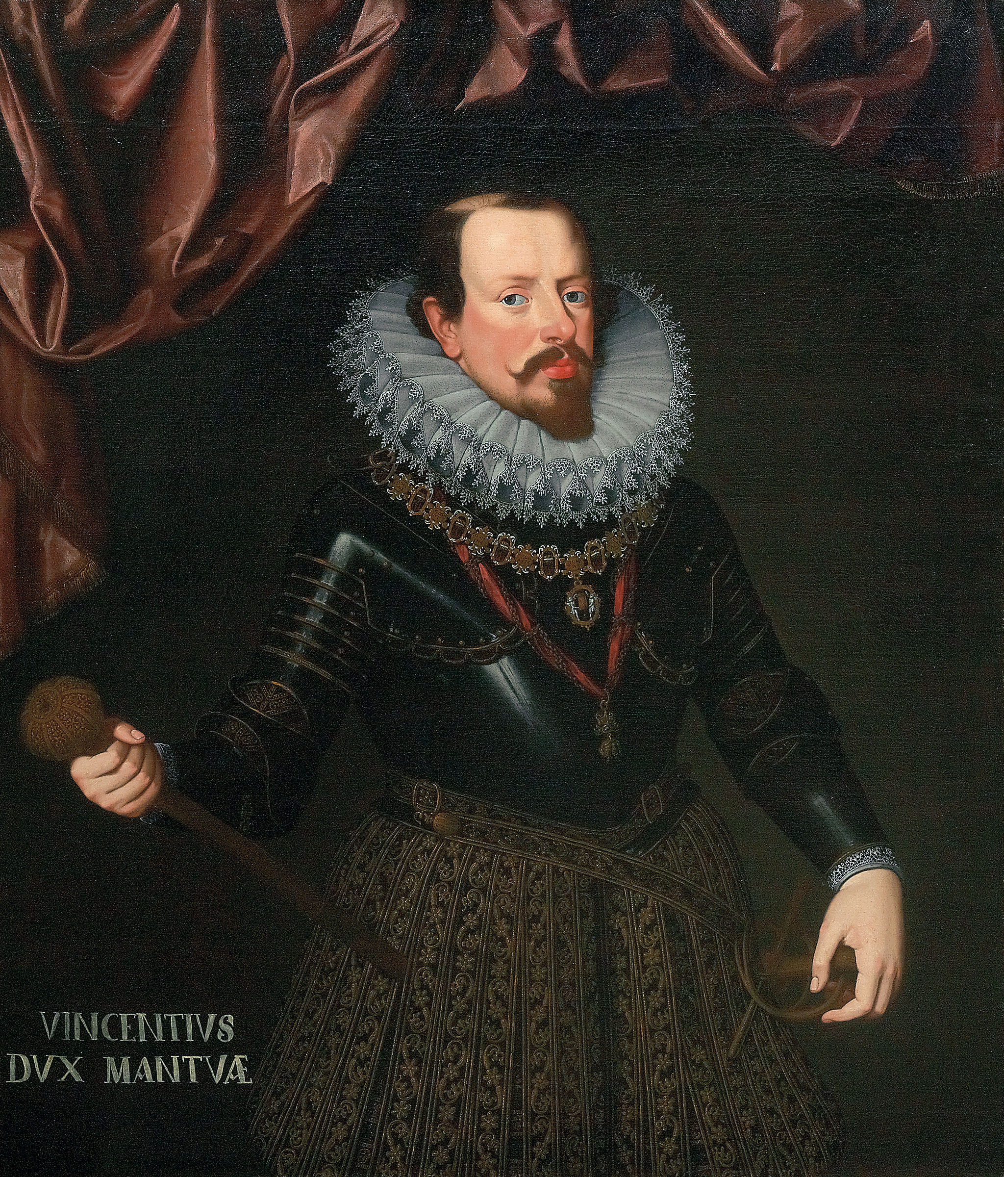 Ritratto di Vincenzo I Gonzaga